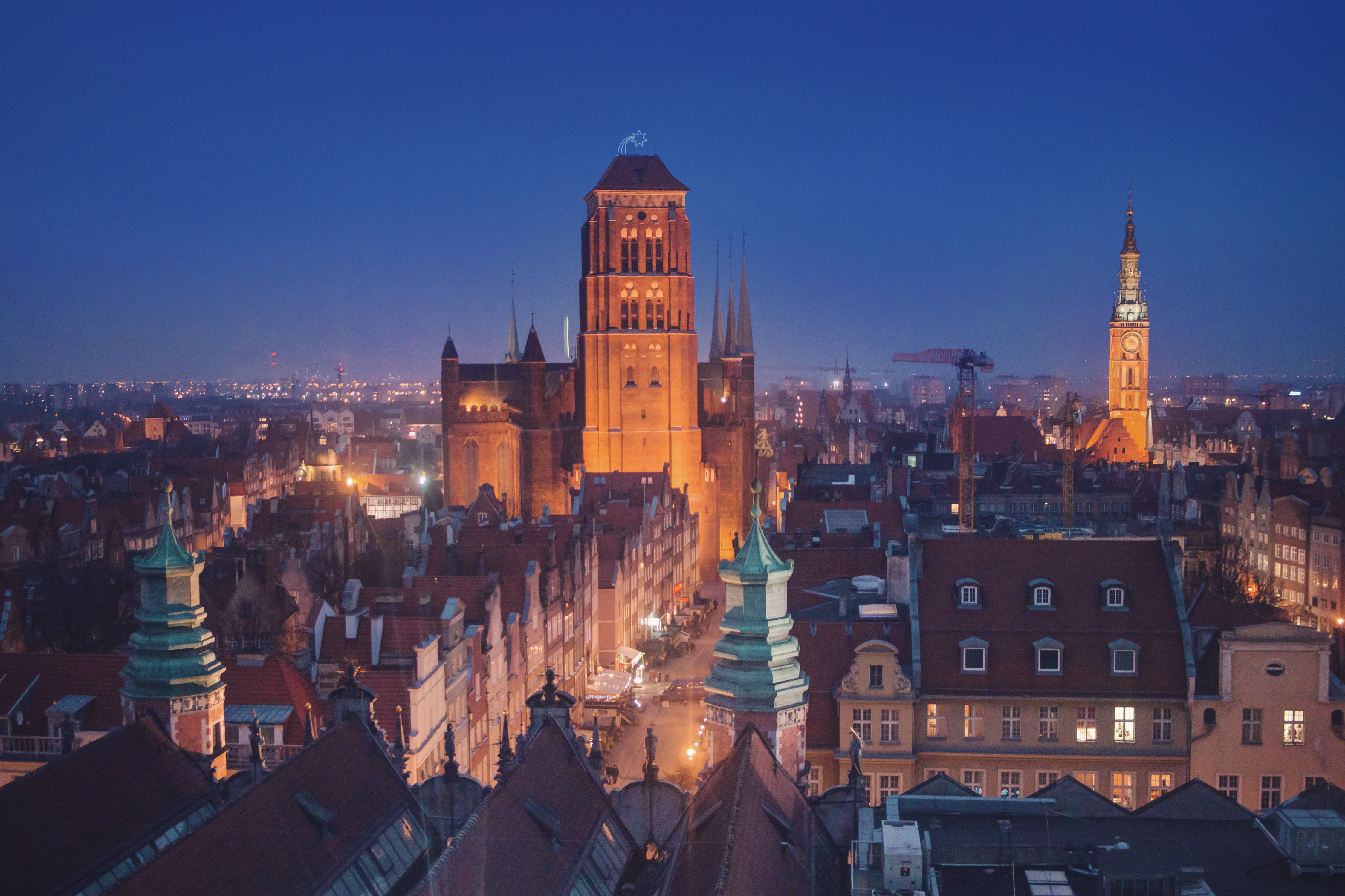 Gdańsk, Stare Miasto Wikidata has entry Q1165324 with data related to this item.